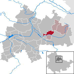 Großneuhausen in Thuringia - District Sömmerda